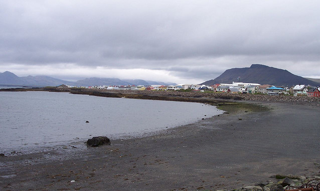 Séð yfir Krókalón Akranesi/Krókalón Akranes